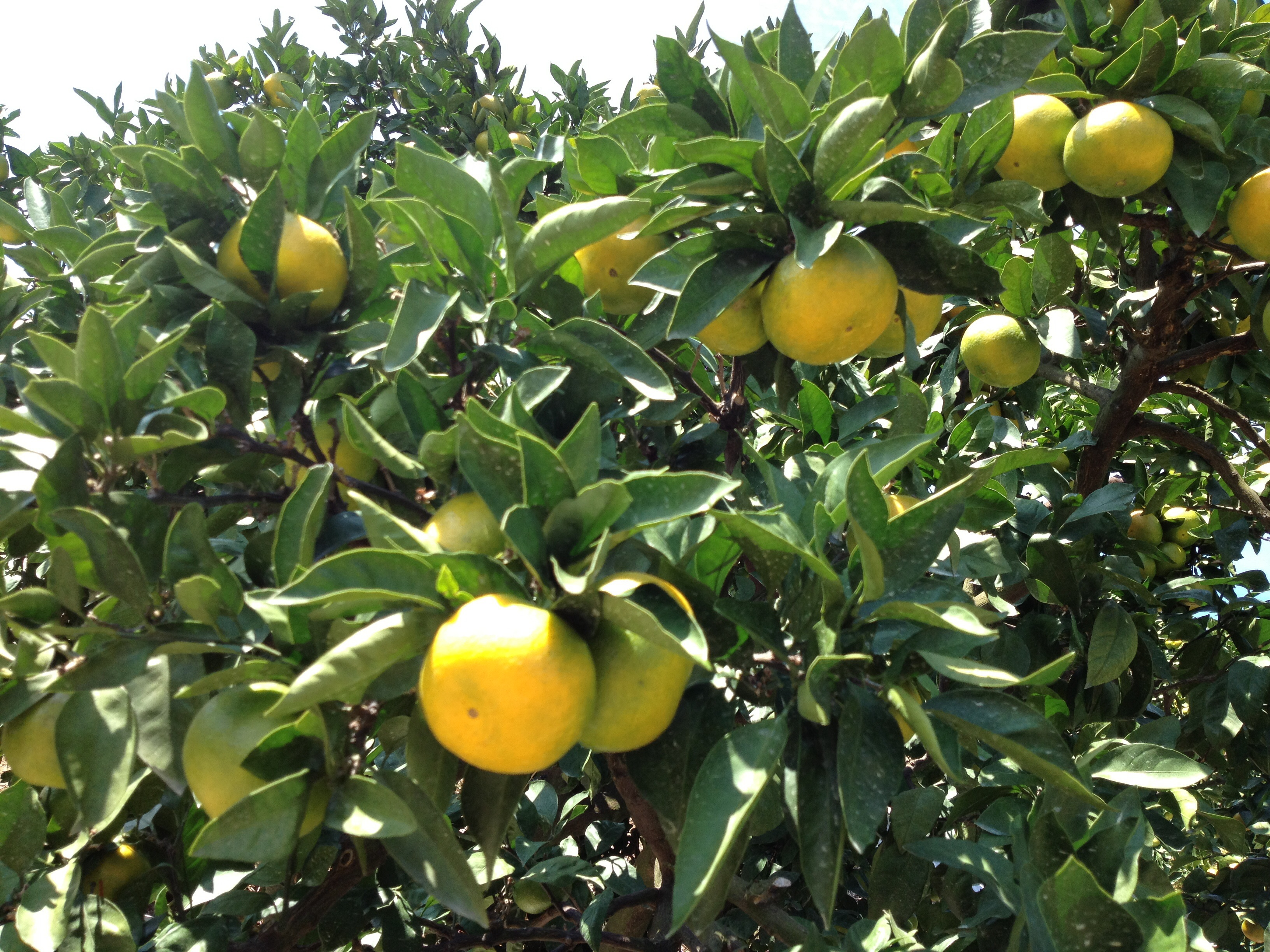 三角みかん（温州 肥のあけぼの）が実っているところです。